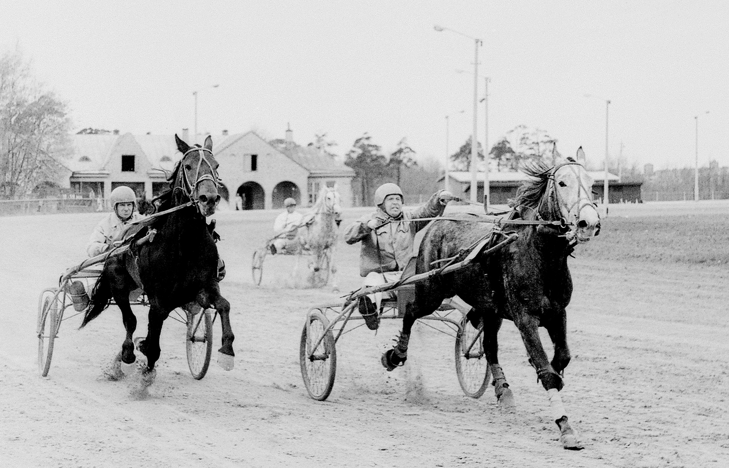 Hipodroom 71 (6)